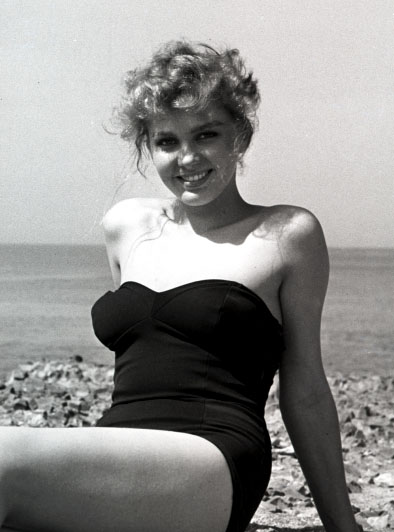 photo from the magazine Settimanale illustrato (1959)